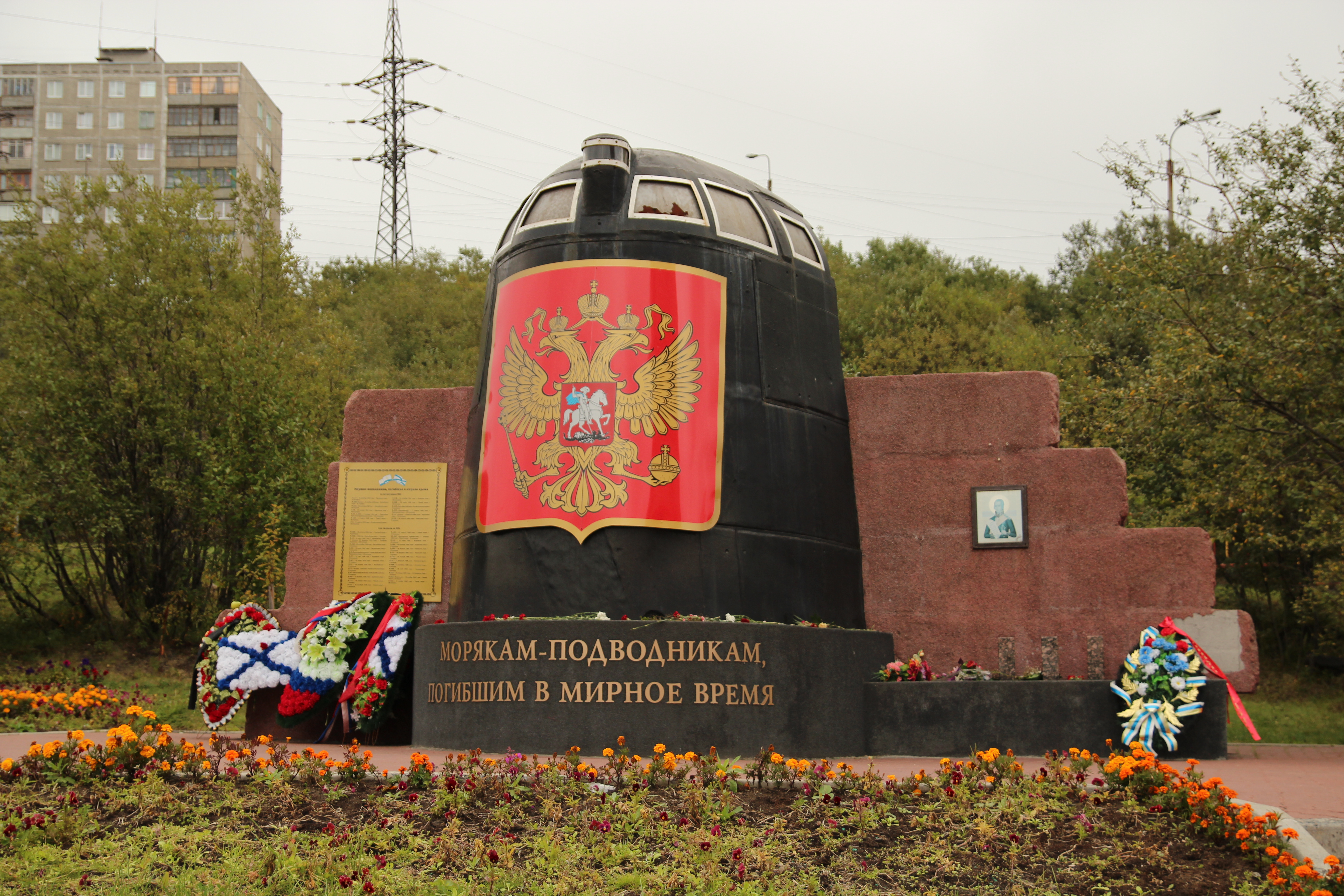 Рубка Курска